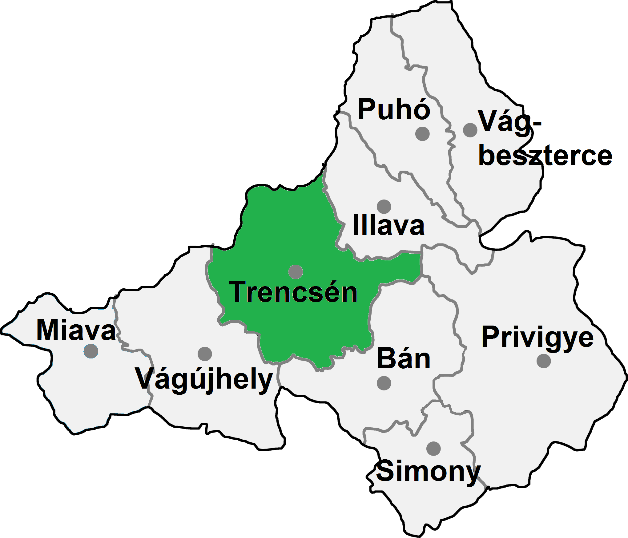 Trencséni járás